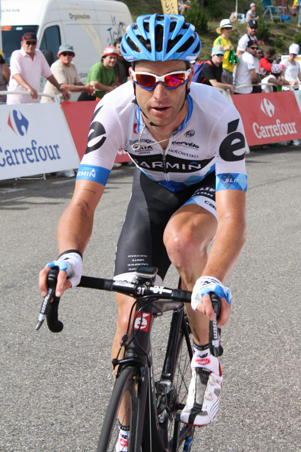 Christian Vande Velde, le 16 juillet 2011, à l'arrivée de la 14ème étape du Tour de France au Plateau de Beille.